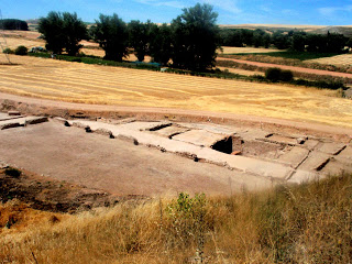 Fotografía del yacimiento de la Villa romana de molino de Arriba. Situada en el pueblo de Buniel (Burgos)